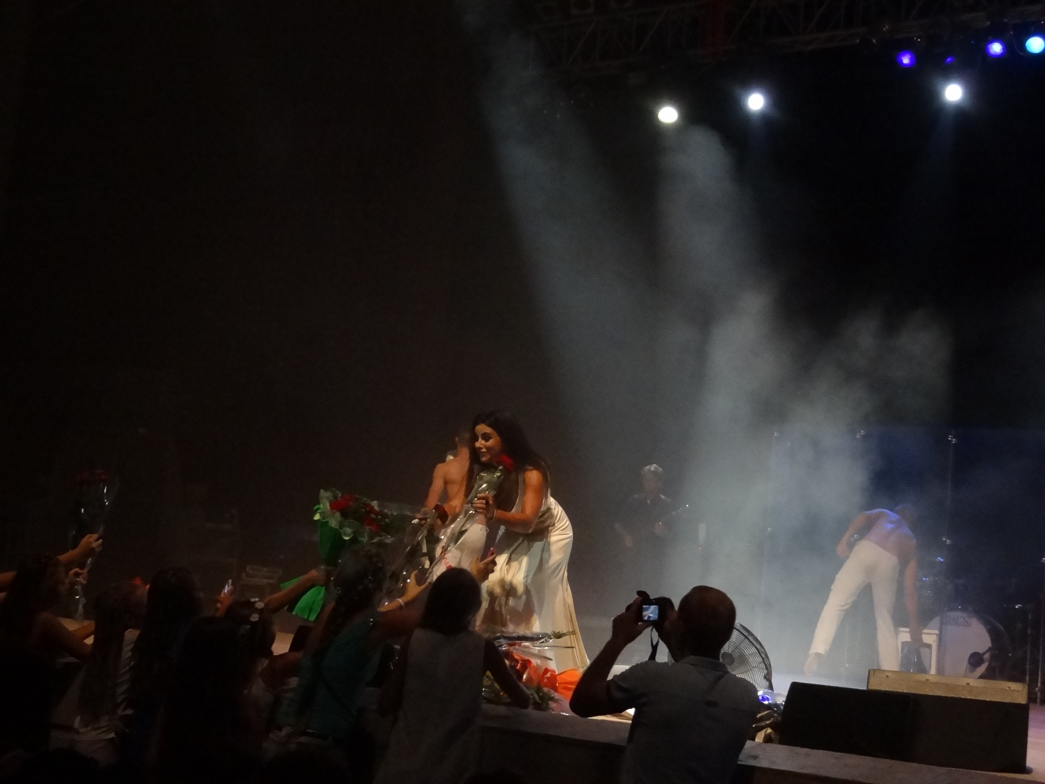 Концерт Ani Lorak в Сочи 2014